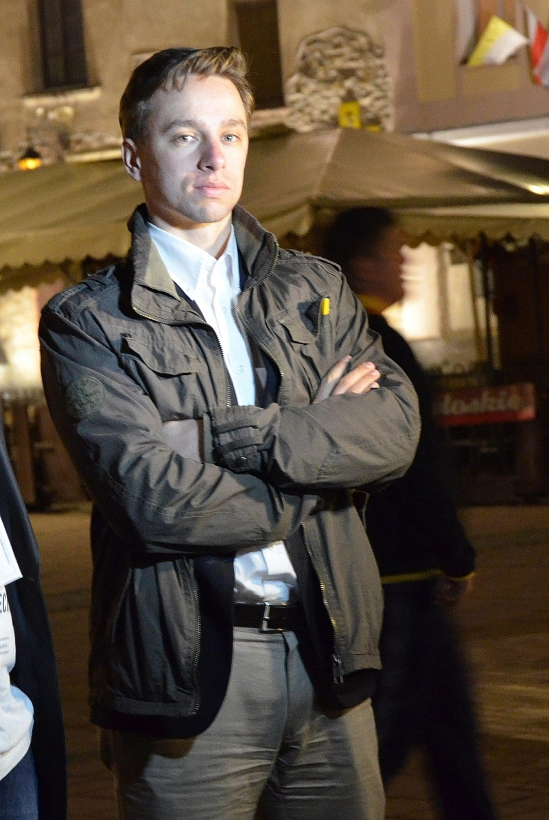 Rocznica śmierci rotmistrza Witolda Pileckiego w Sanoku